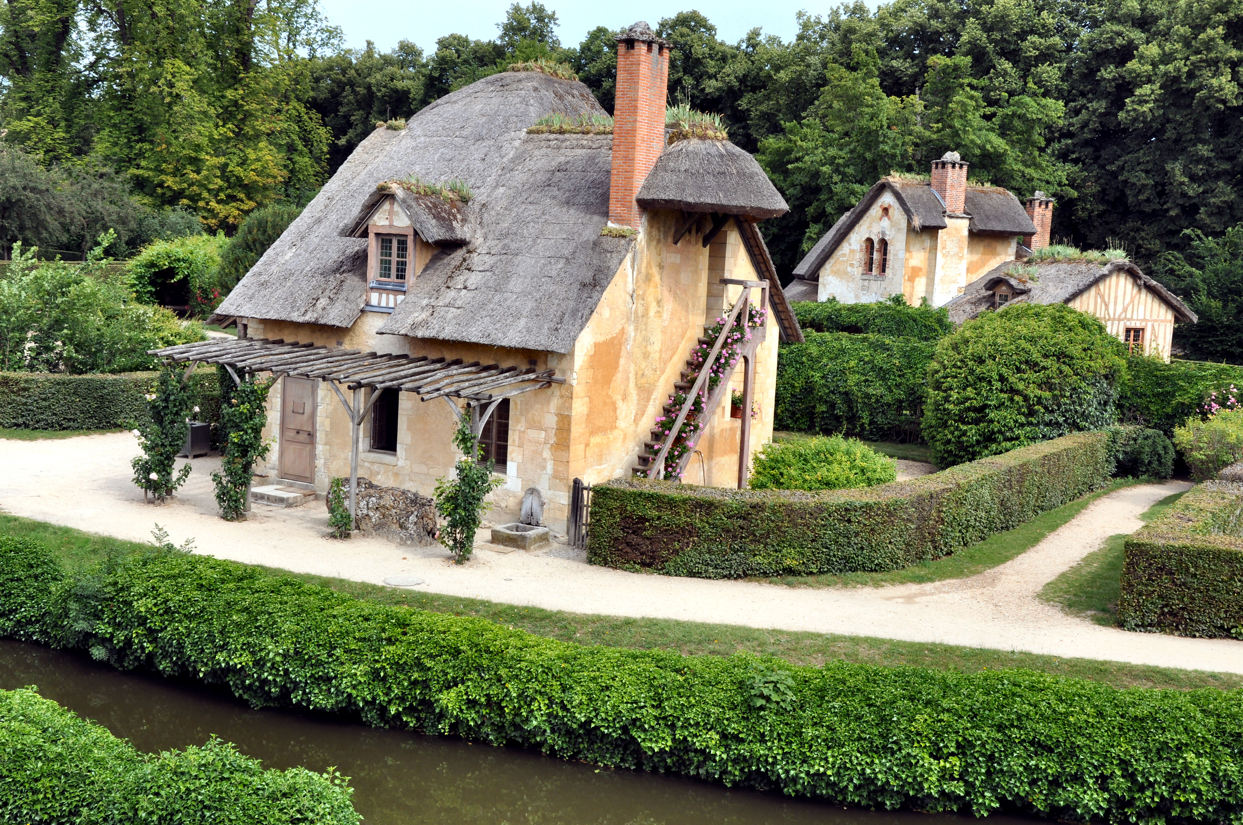 Colombier et Maison du garde du Hameau de la Reine (vue du premier étage de la maison de la Reine)